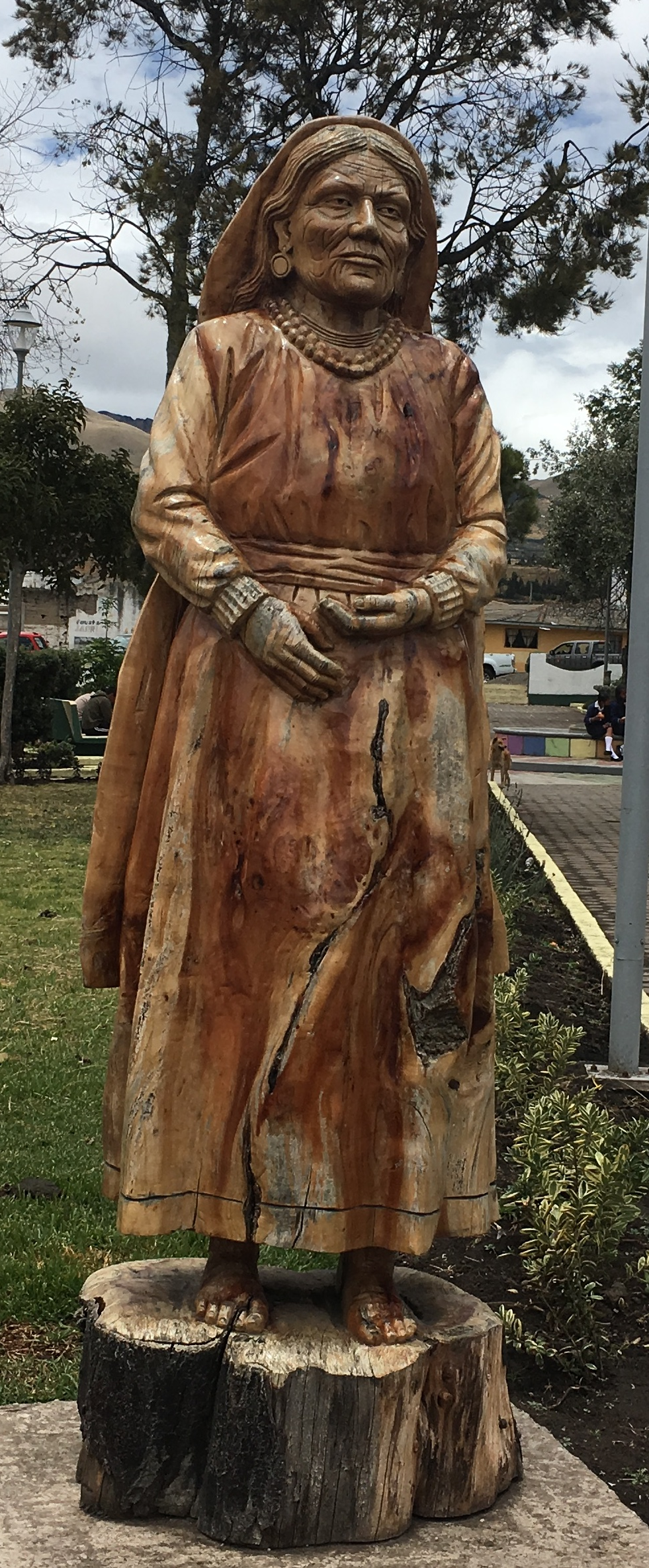 Estatua tallada en madera de Dolores Cacuango en el Parque Central de Olmedo (Ecuador)